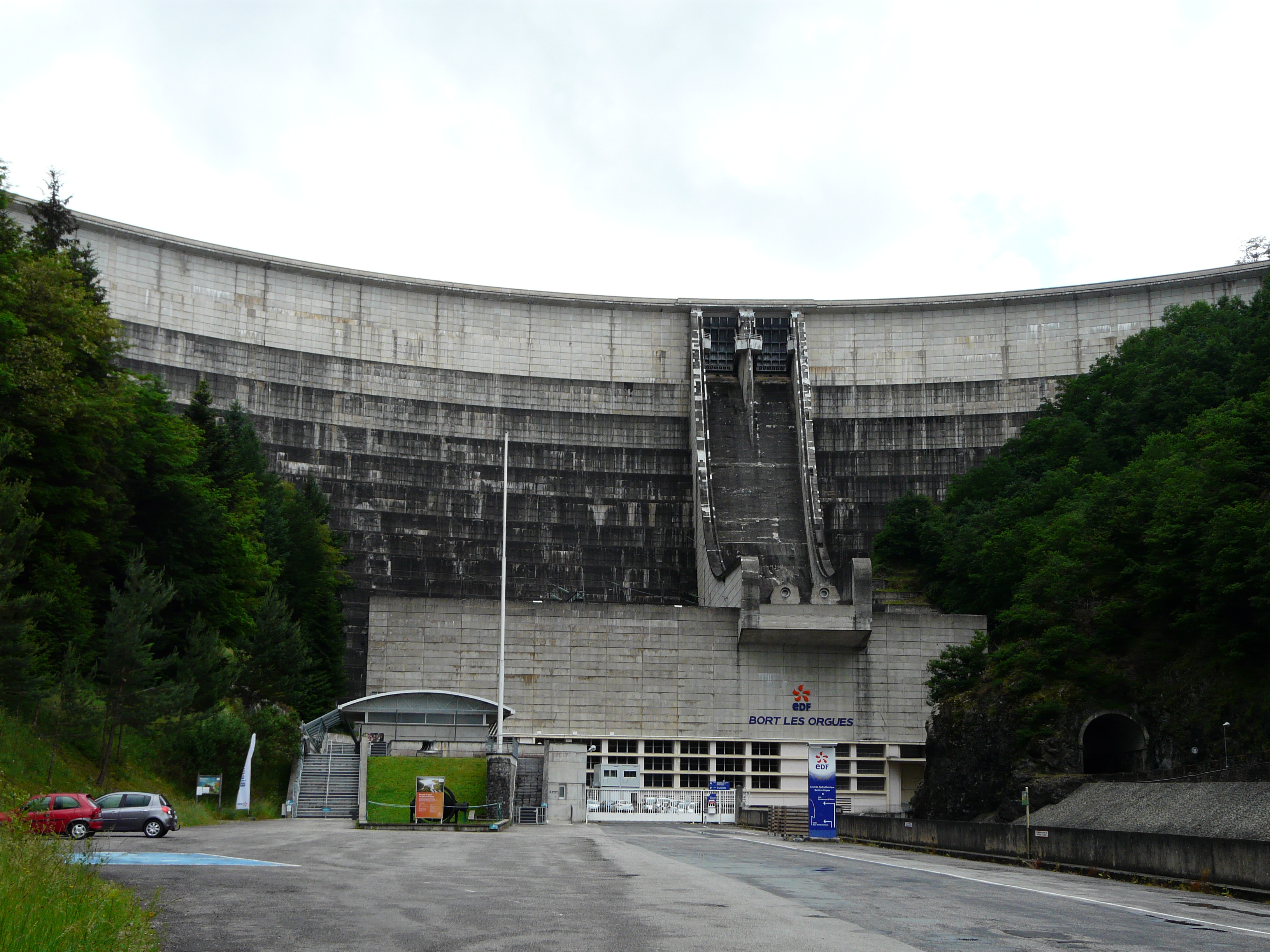 Le barrage de Bort-les-Orgues, entre les départements de la Corrèze (à gauche) et du Cantal (à droite), France.